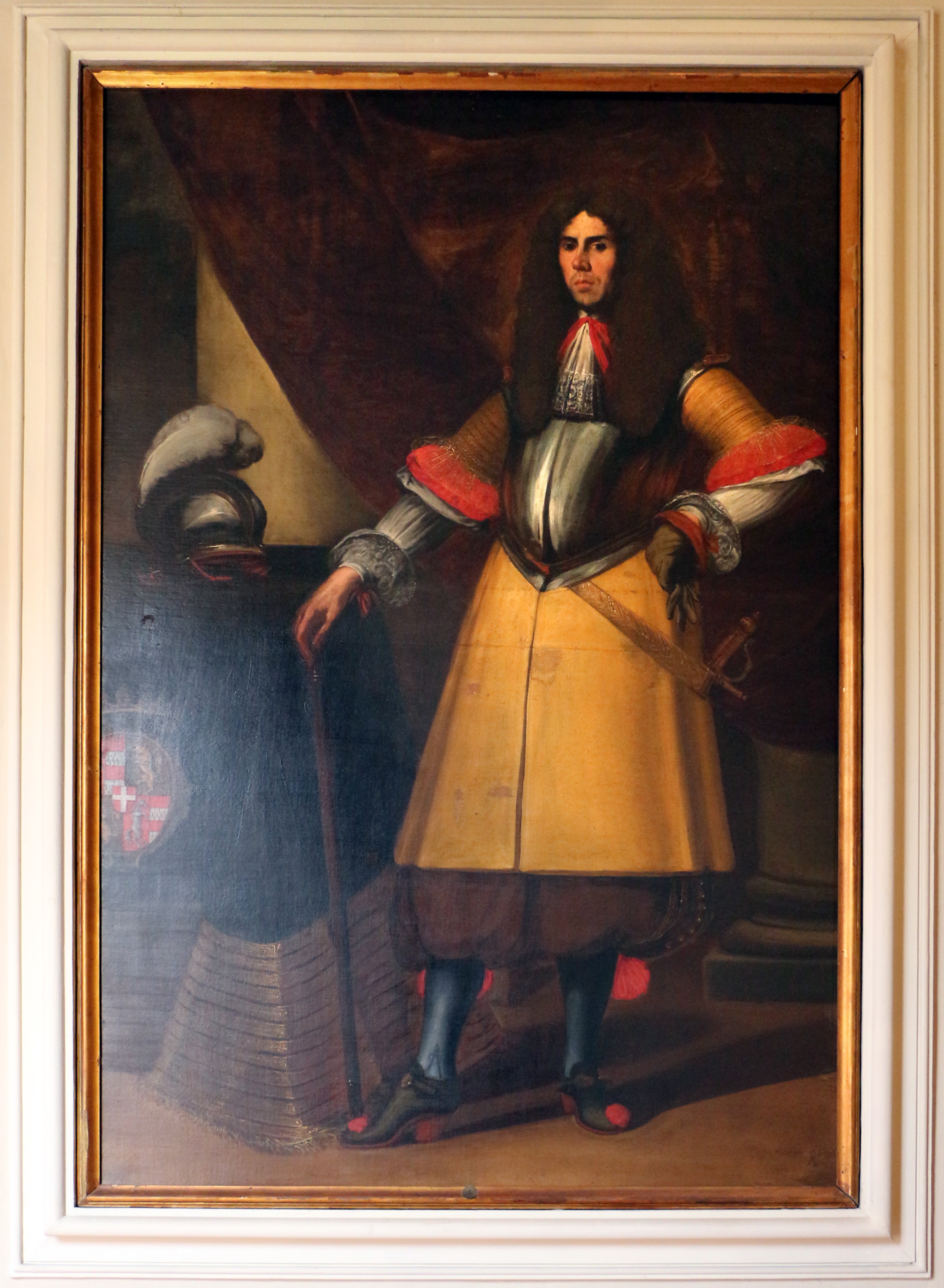 Palazzo dei Diamanti (Ferrara) This is a photo of a monument which is part of cultural heritage of Italy.